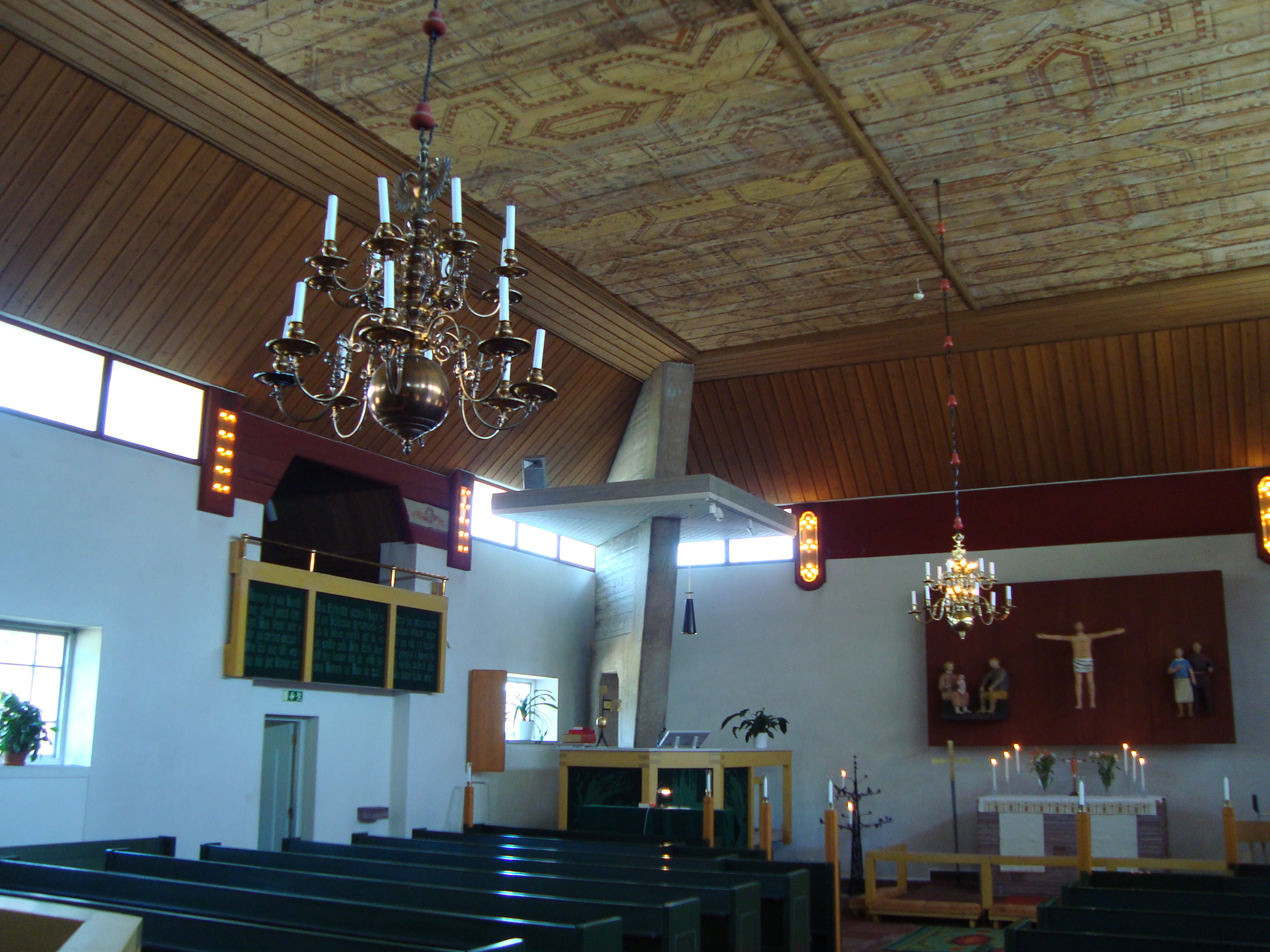 Aspeboda kyrka, Falu kommun, Sverige